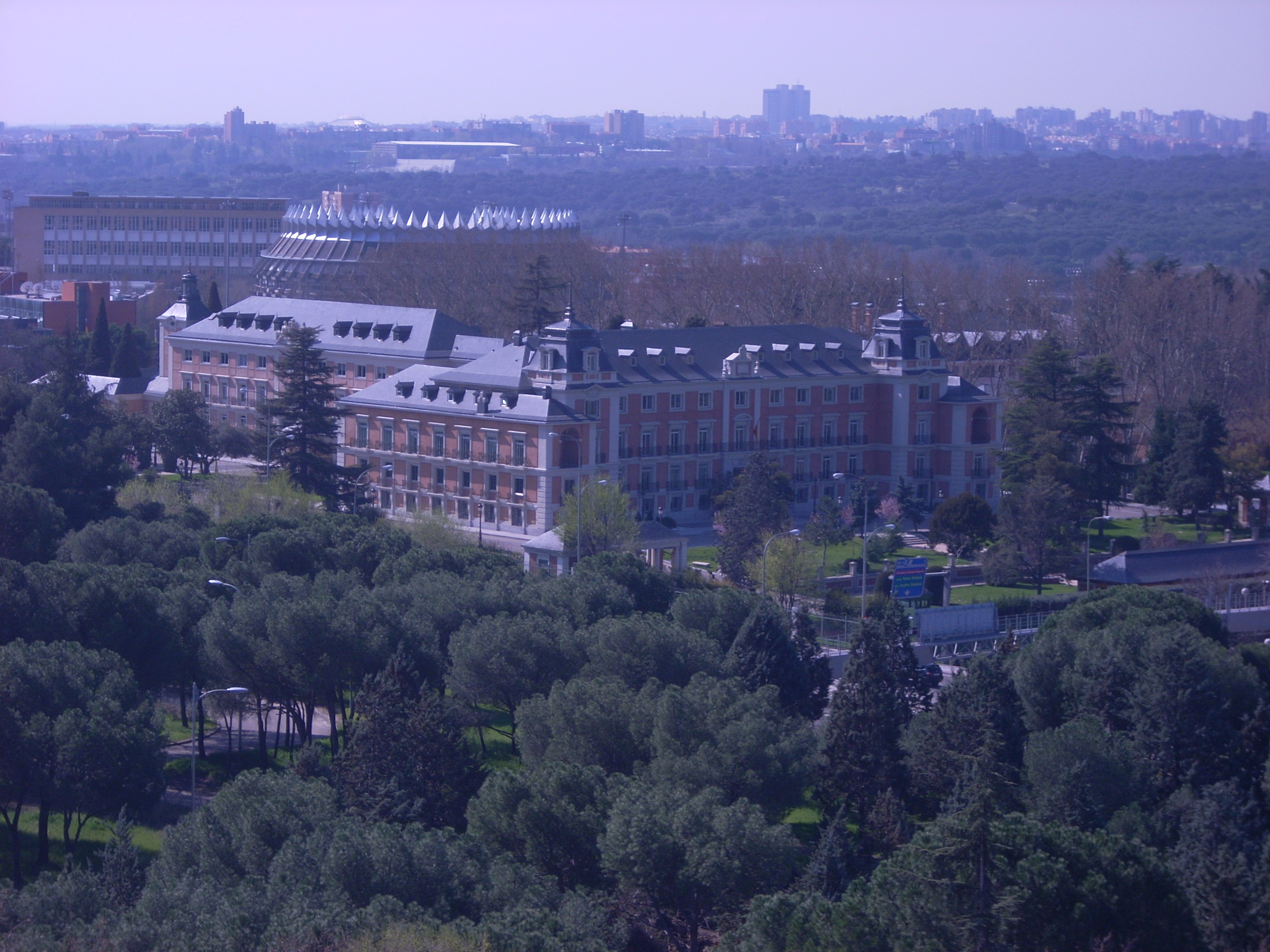 Vista del complejo de la Moncloa desde la Ciudad Universitaria